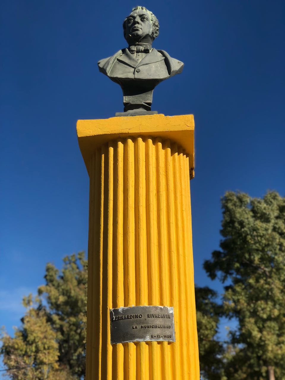 Busto de Bernardino Rivadavia. Av. Alsina y Av. Rivadavia. posicion -45.862278, -67.493994, Comodoro Rivadavia. Chubut. Argentina.